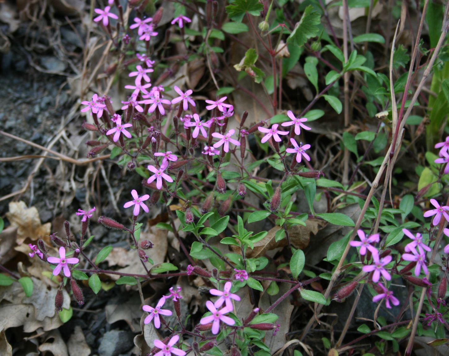 Kleines Seifenkraut (Saponaria ocymoides), Nelkengewächse (Caryophyllaceae) - Italien/Italia/Italy: Toscana, Prov. Lucca, Garfagnana, Piazza al Serchio